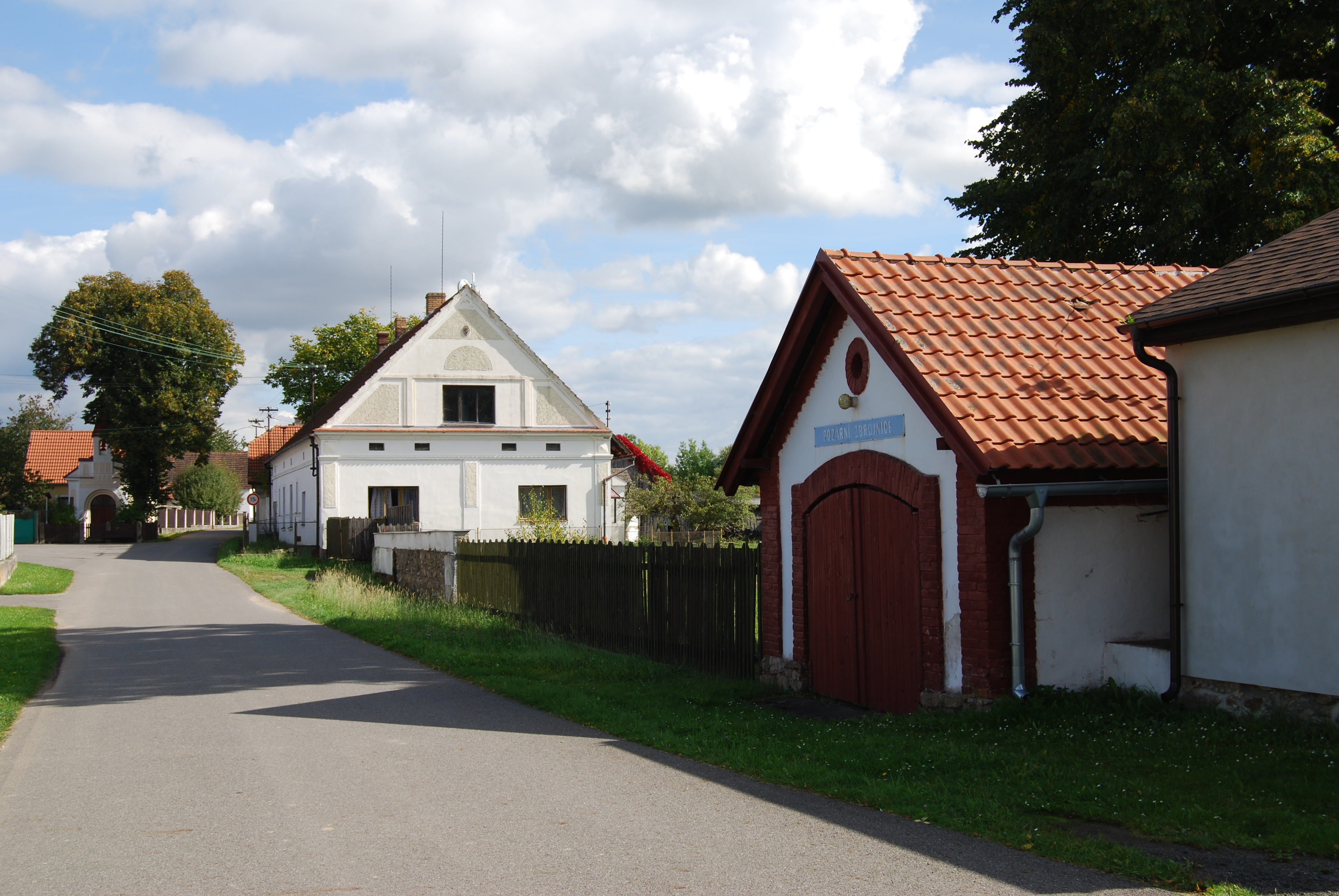 Pohled na část obce. Okrouhlá (Okres Písek). Česká republika.